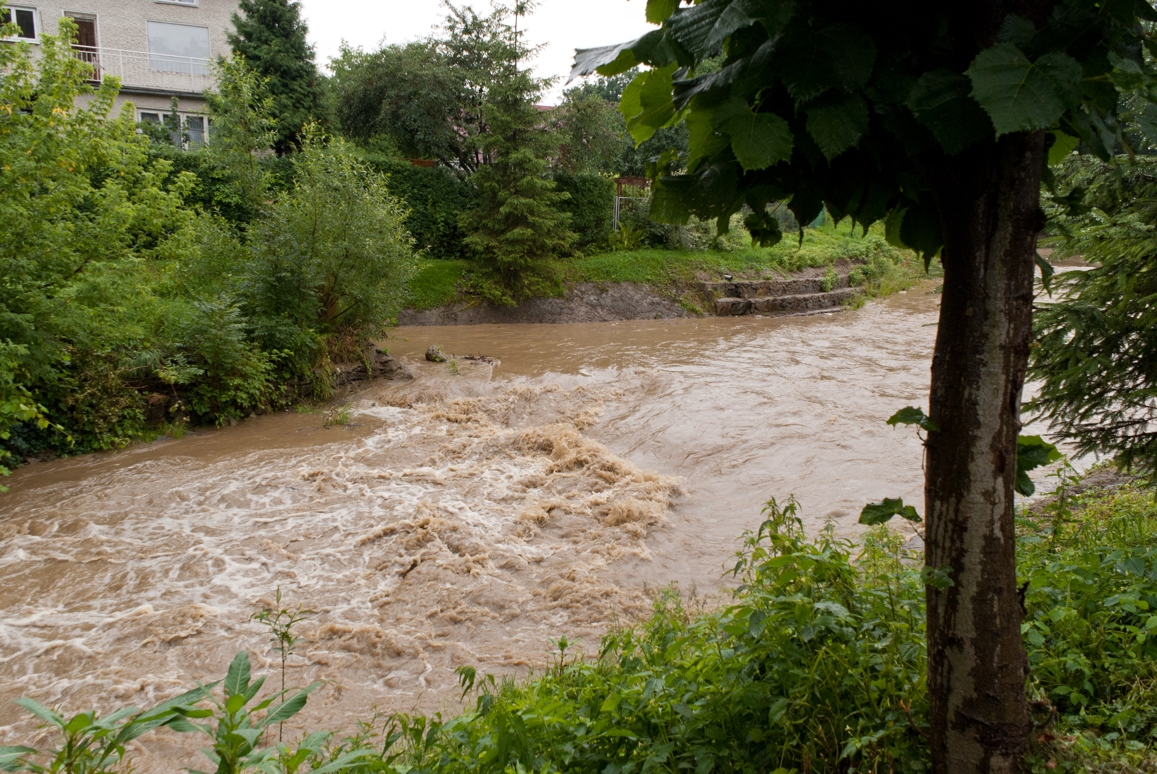 Rzeka Tabor w Rymanowie